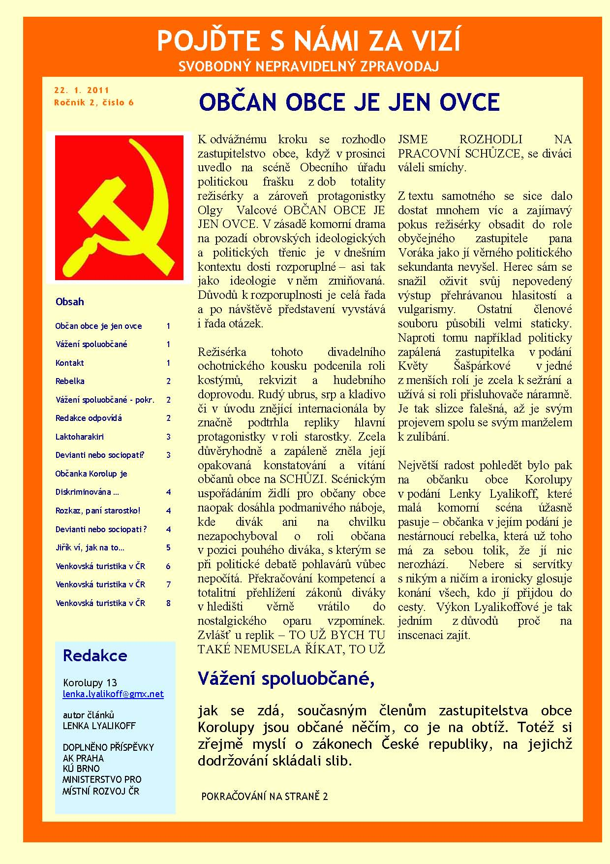 Zpravodaj volebního seskupení Pojďte s námi za vizí v roce 2007